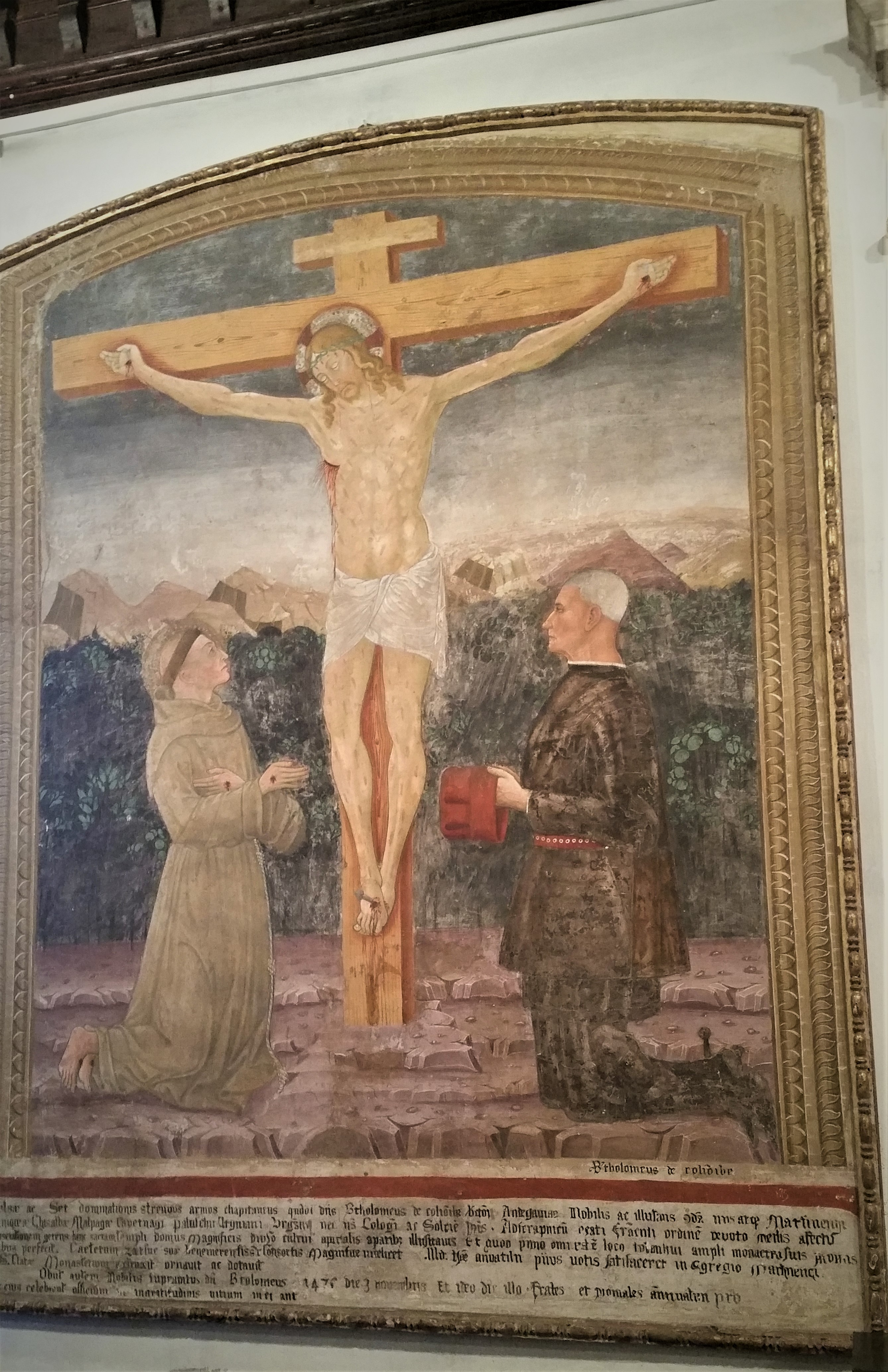 Dipinto presente nel Luogo Pio Colleoni